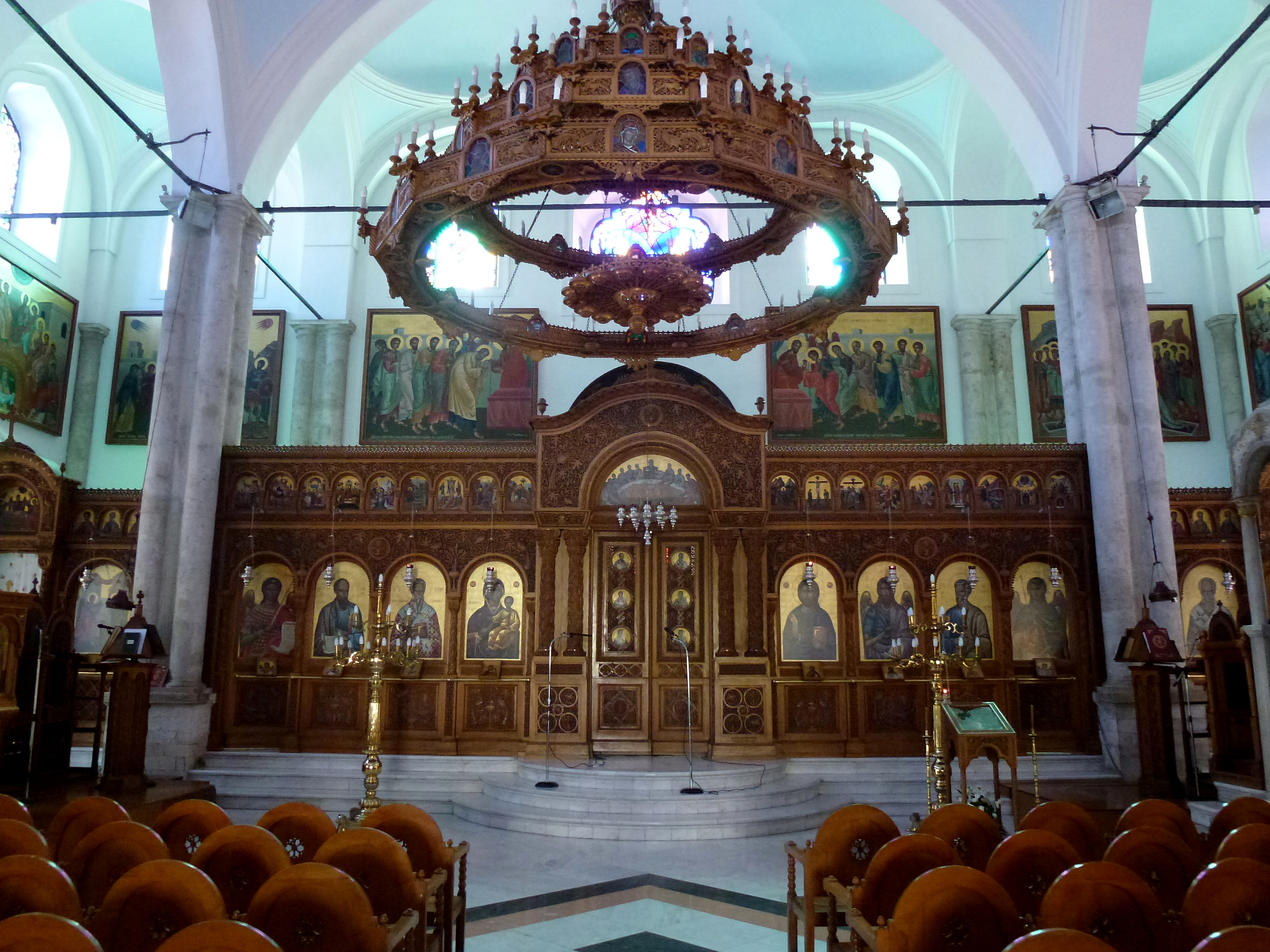 Der Kronleuchter aus Holz mit bleiverglasten Bildern von Heiligen inmitten der Kirchenschiffes